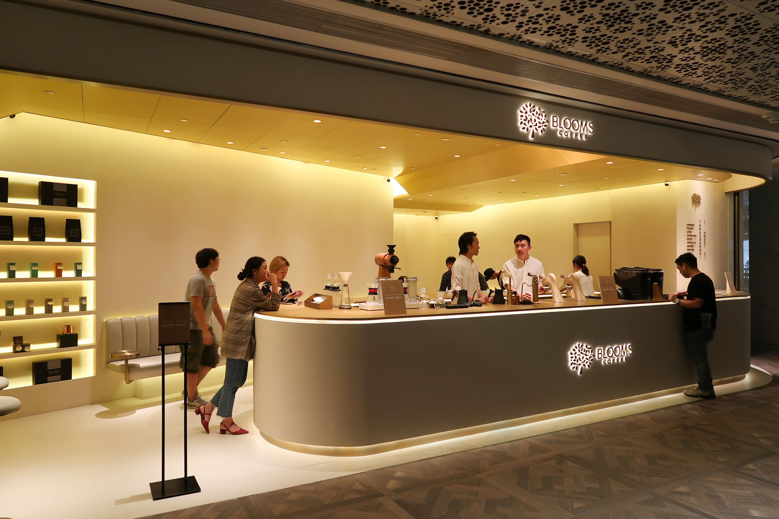 BLOOMS Cafe in K11 MUSEA